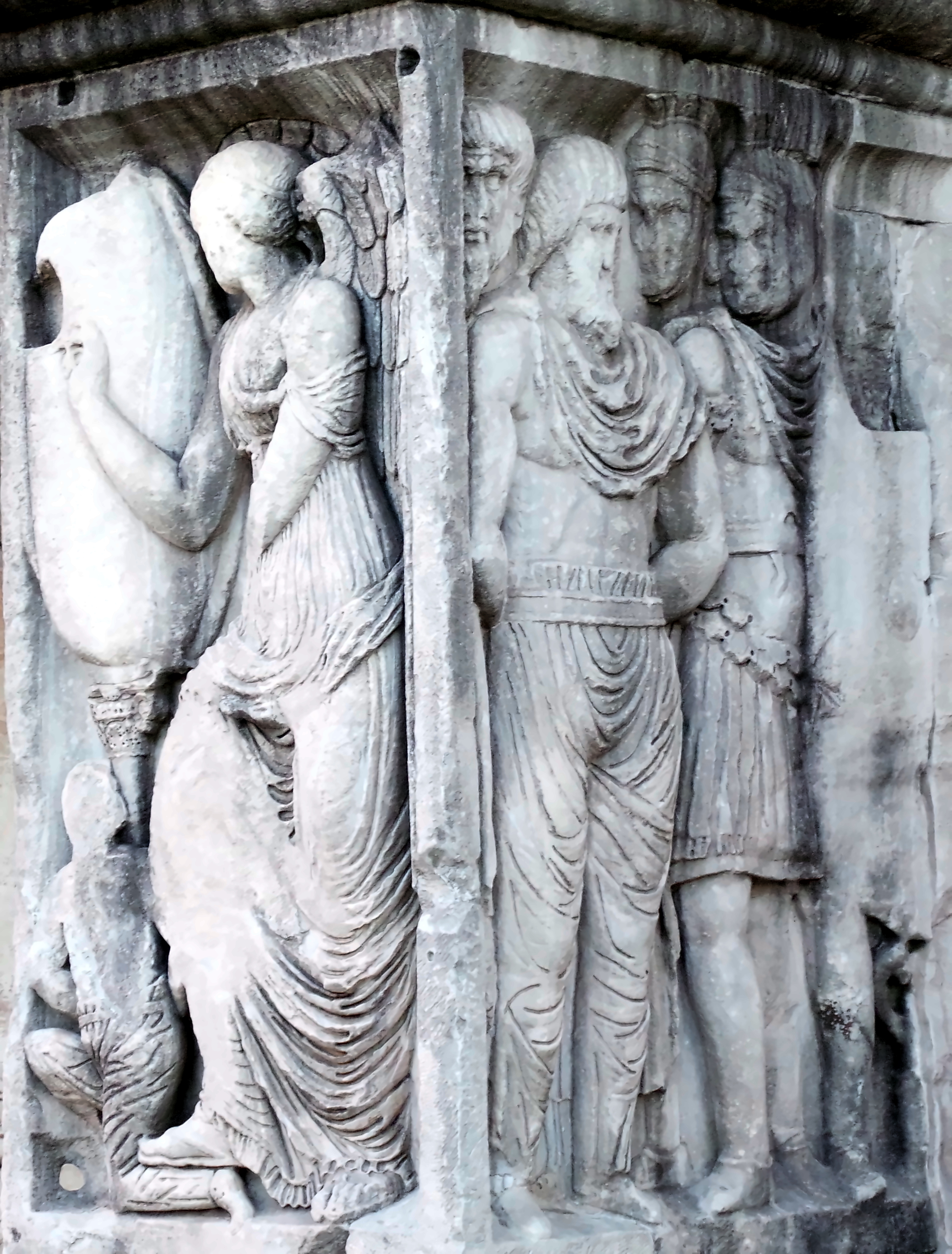 Säulenrelief (Südseite)